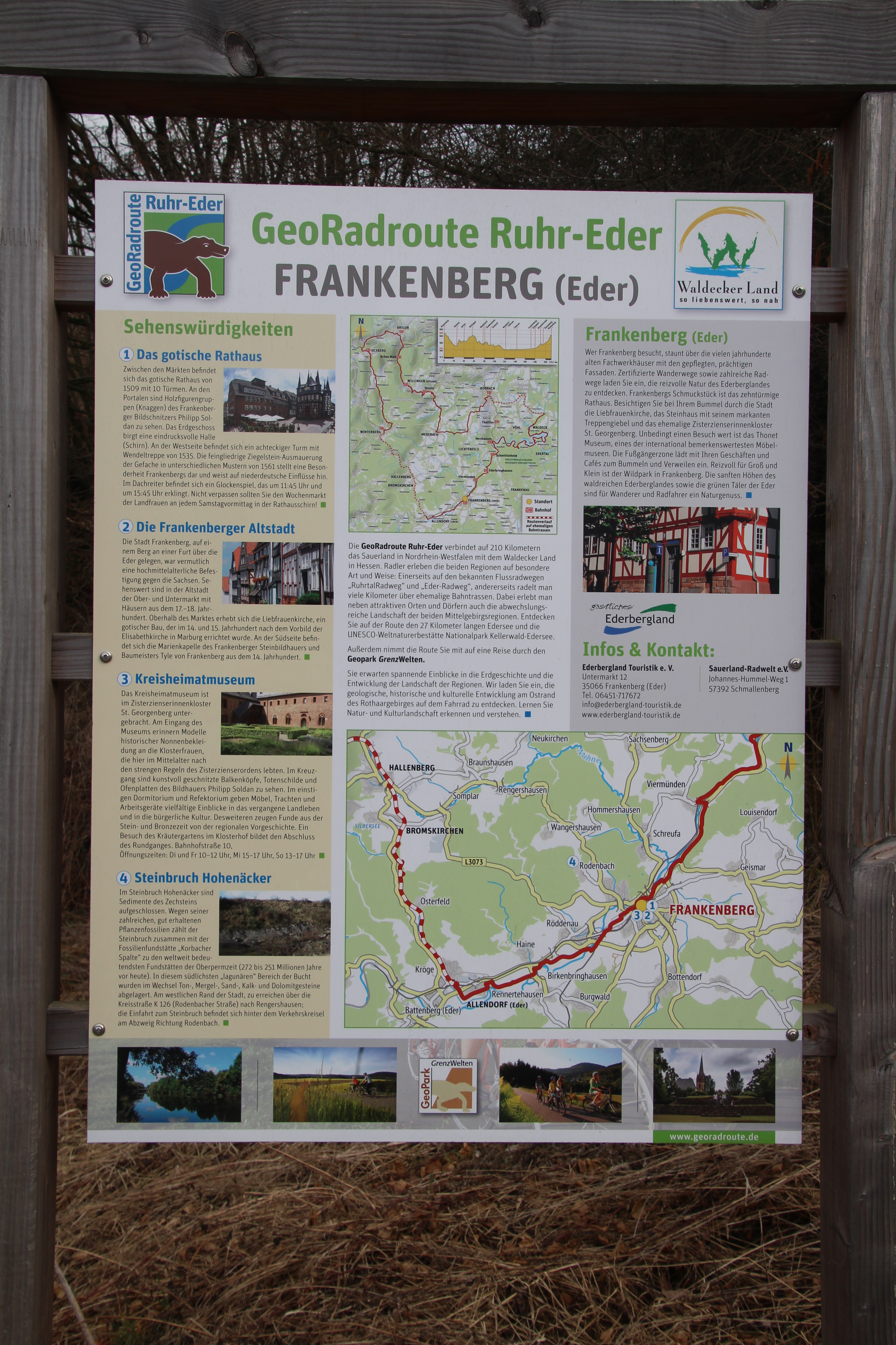 Siehe Bild und Dateiname